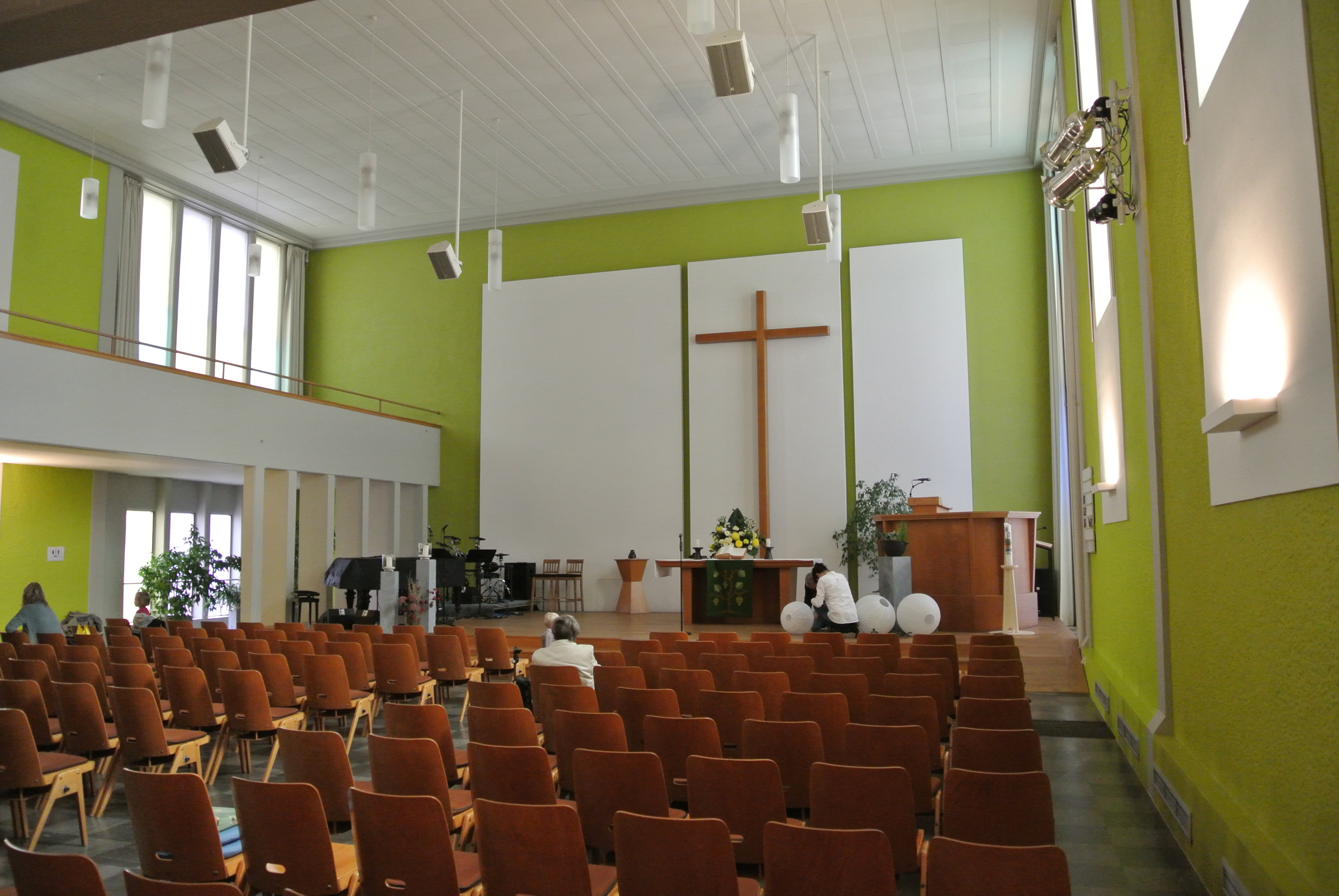 Nord-Ost-Kirche in Frankfurt-Ostend, Wingertstraße, Innenraum